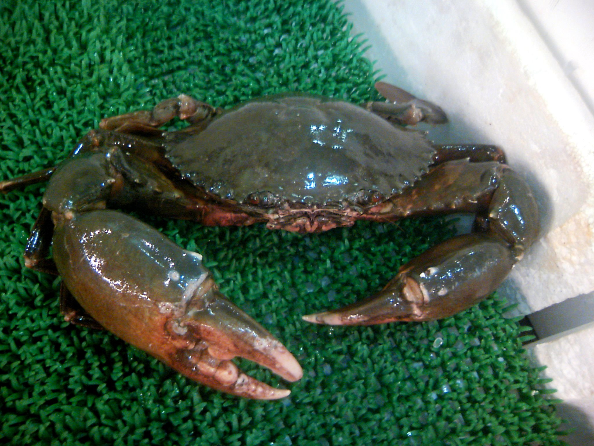 三重県産ノコギリガザミ